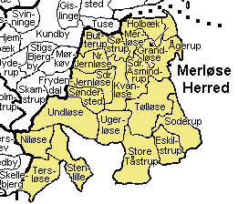 Merløse Herred Holbæk Amt , Denmark. Map by Svend-Erik Christiansen, edited by user:Nico-dk .